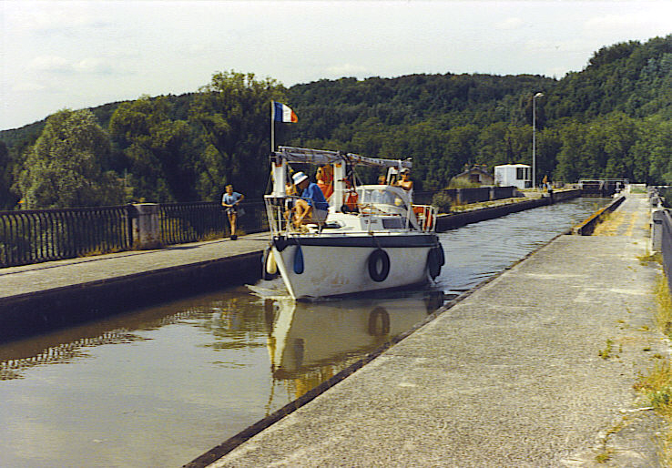 Propre Photo Licensing Catégorie:Image maritime Catégorie:Image de commune de Meurthe-et-Moselle